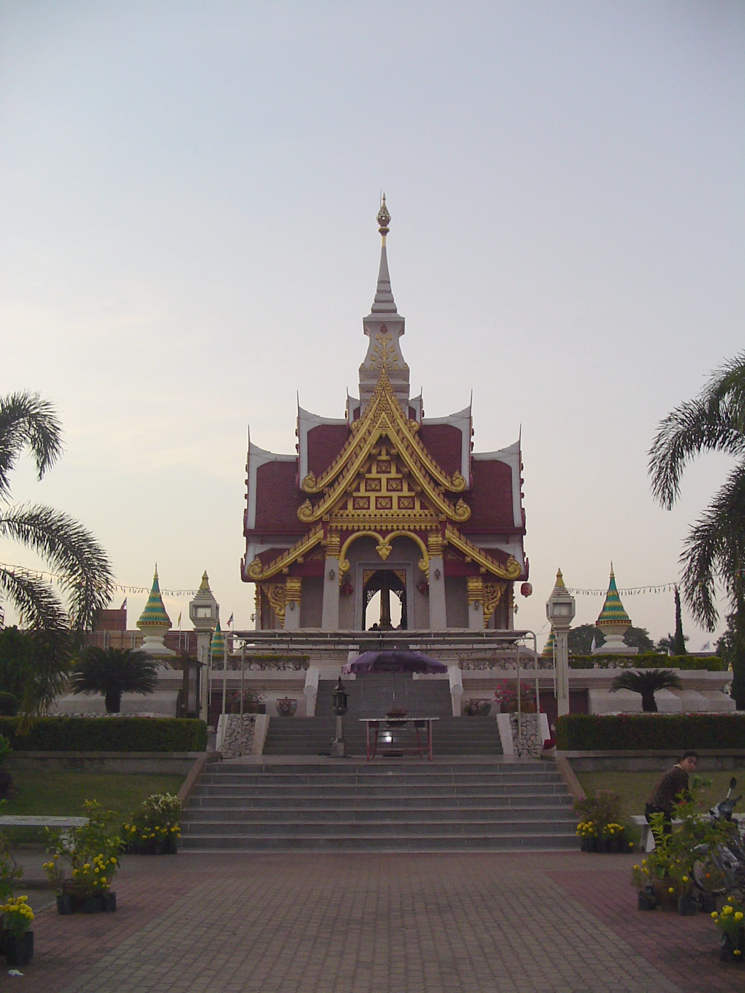 Удон-Тхани кумирняУдон-Тхани кумирня Сао Лак Муеанг